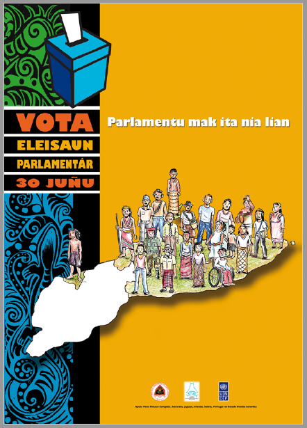 Infoplakat für die Parlamentswahl Osttimor 2007